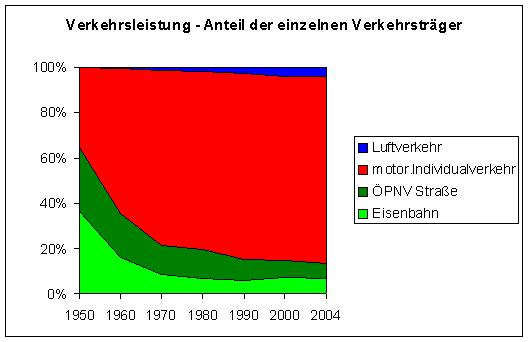 Verkehrsleistung der verschiedenen Verkehrsträger in Deutschland (ab 2000 incl. neue Bundesländer) - in % des Gesamtverkehrs; erstellt mit Excel 2000